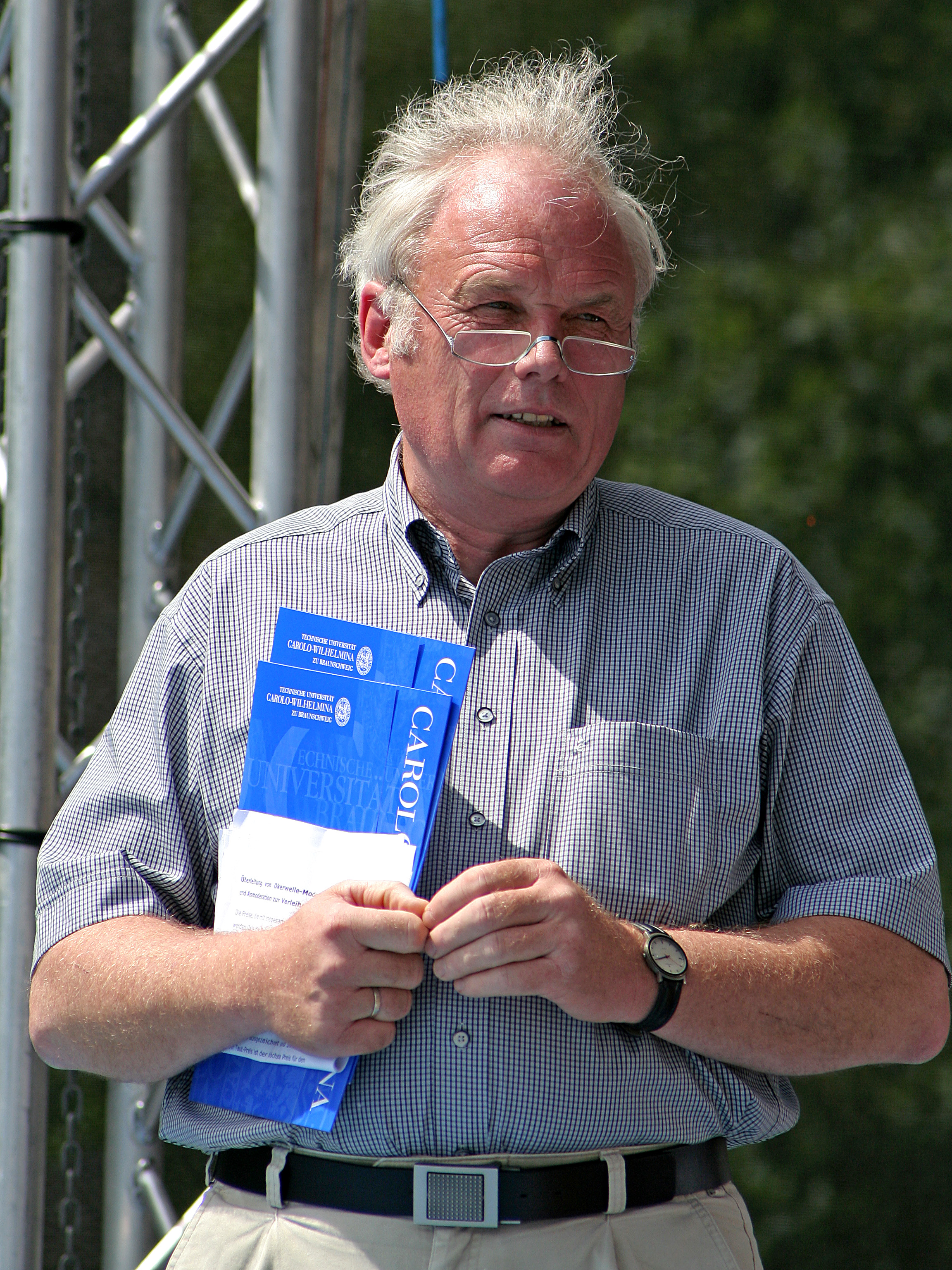 Jürgen Hesselbach auf dem TU Day der Technischen Universität Braunschweig, 14. Juli 2007